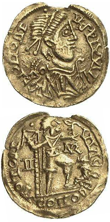 קראַנטקייַט סועוואַ (411-450) פון זילבער. דערווייַל דער נאַציאָנאַלער מוזיי אין בערלין